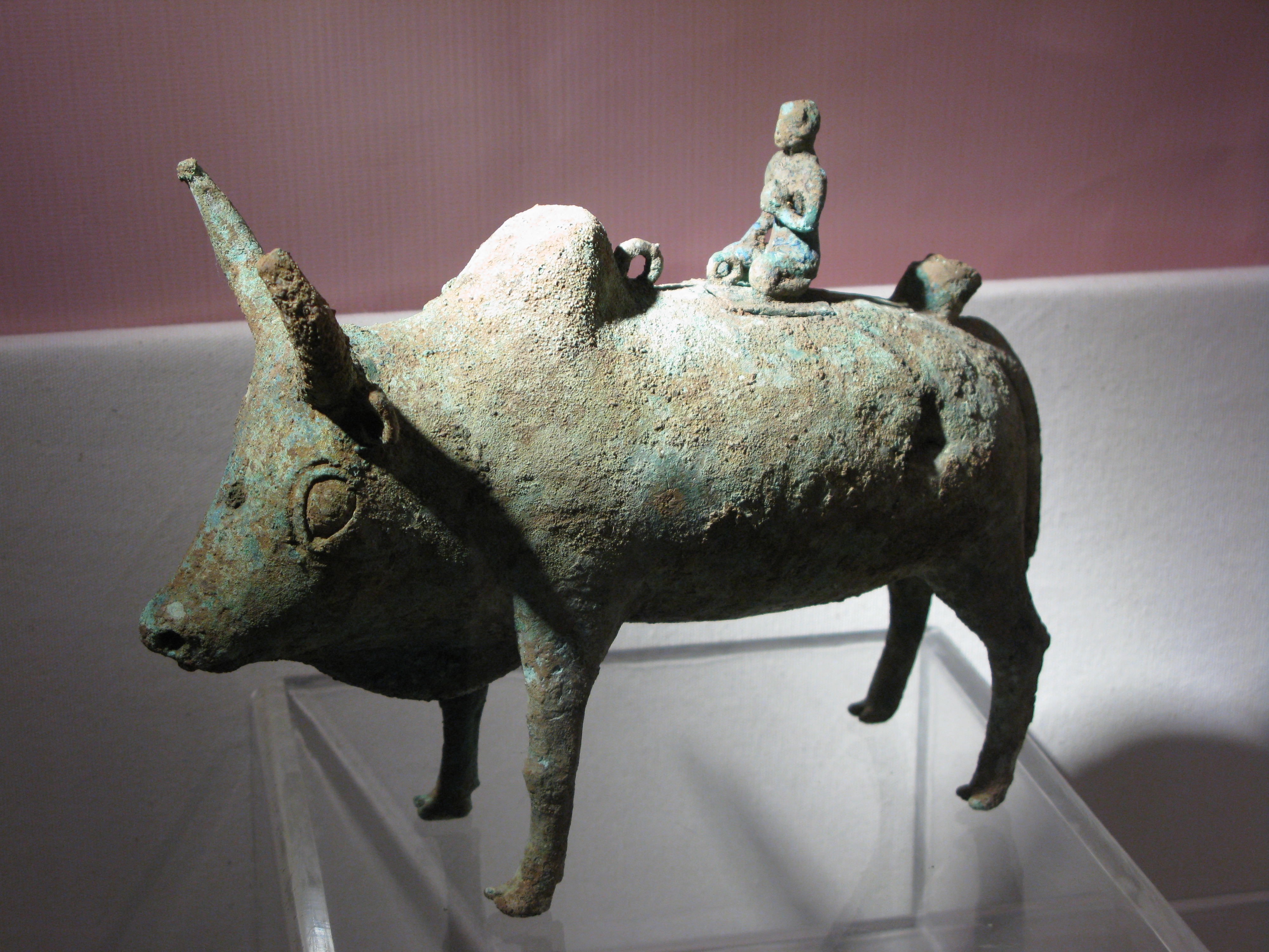 Đế đèn hình người cưỡi trâu bằng đồng. Di vật khảo cổ văn hóa Đông Sơn trưng bày tại Bảo tàng Lịch sử Việt Nam